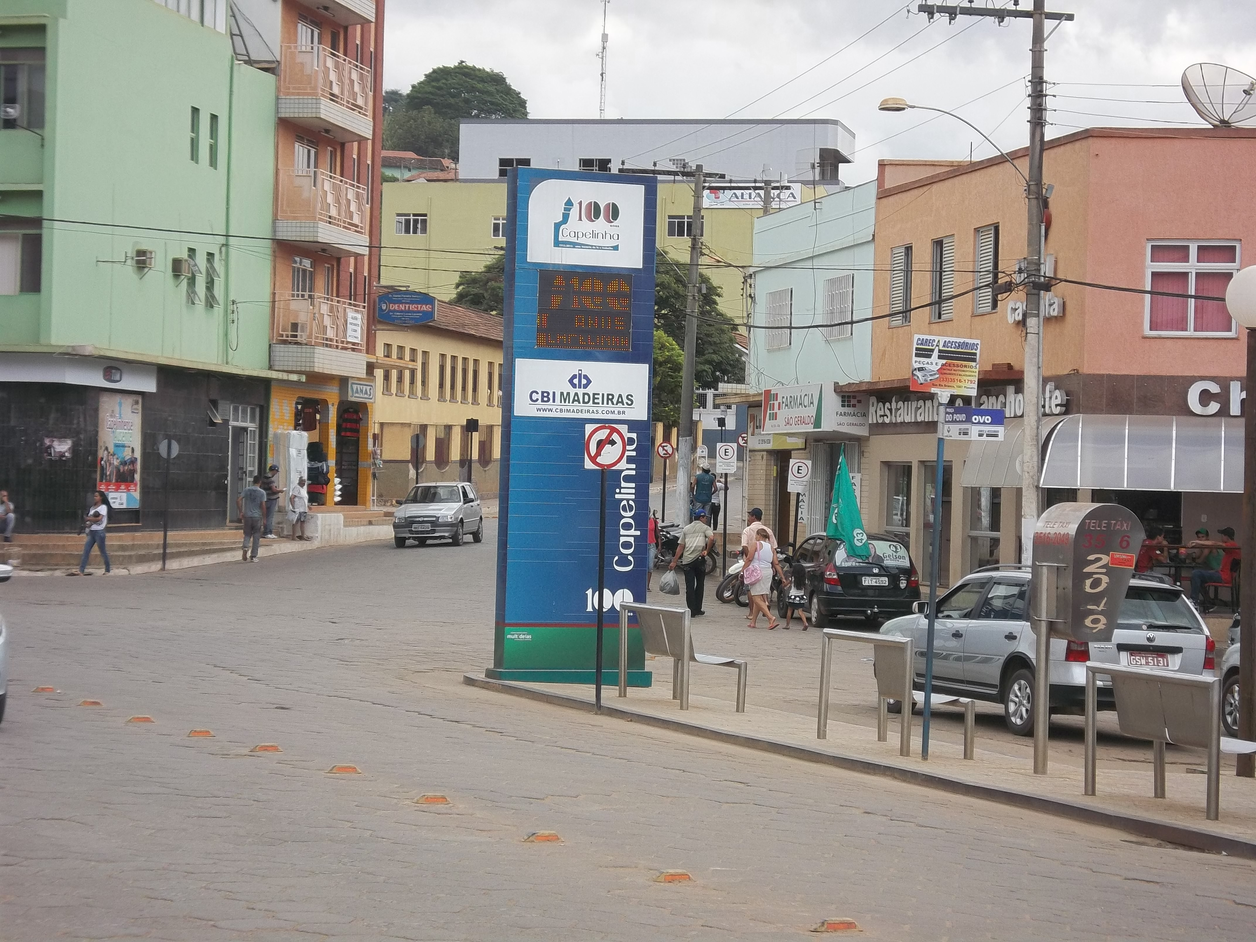 Centro de Capelinha - Rua Governador Valadares